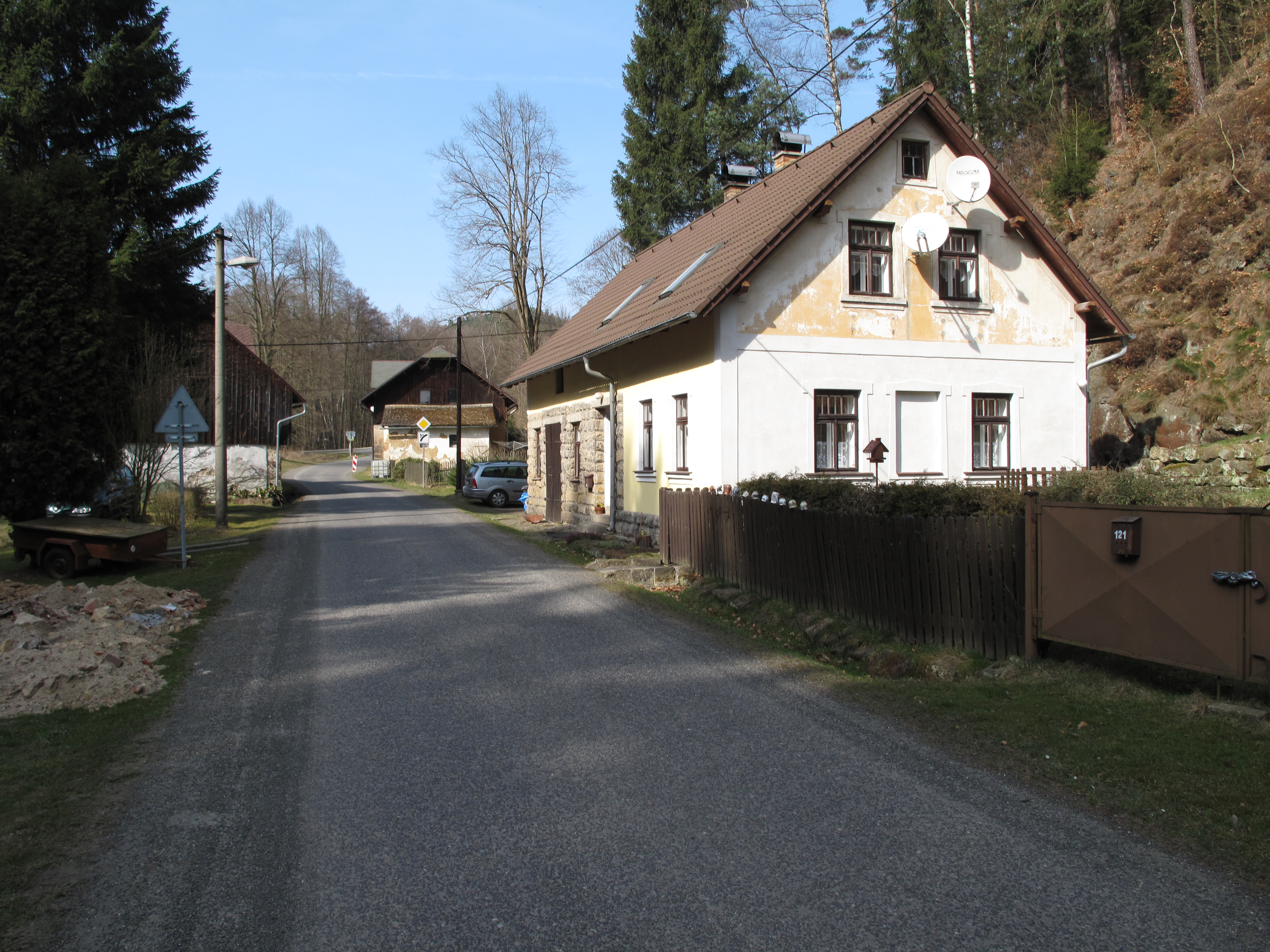 Domy ve Vlachovém. Okres Liberec, Česká republika.